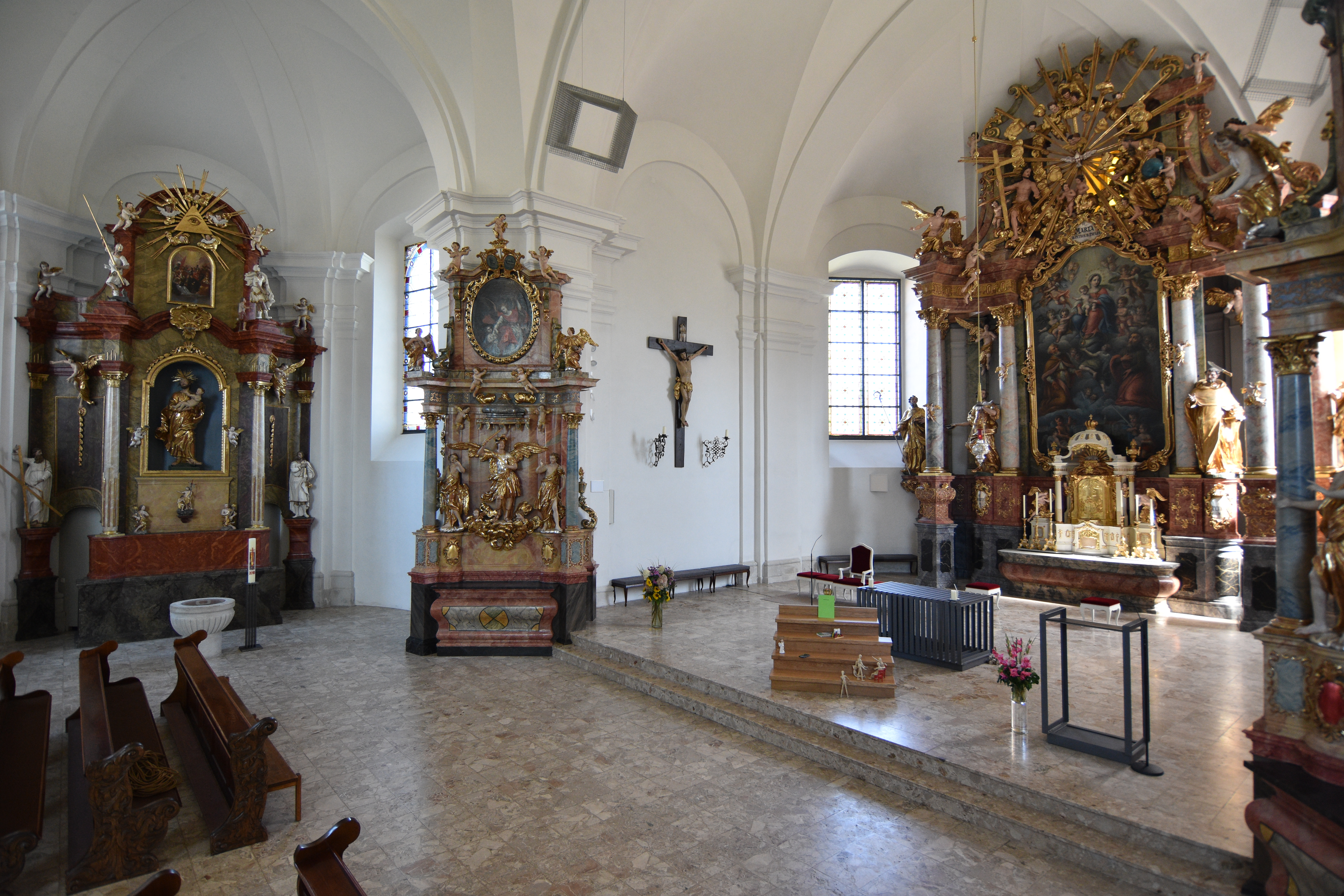 Church Pfarrkirche hl. Petrus und Paulus, Birkfeld Interior